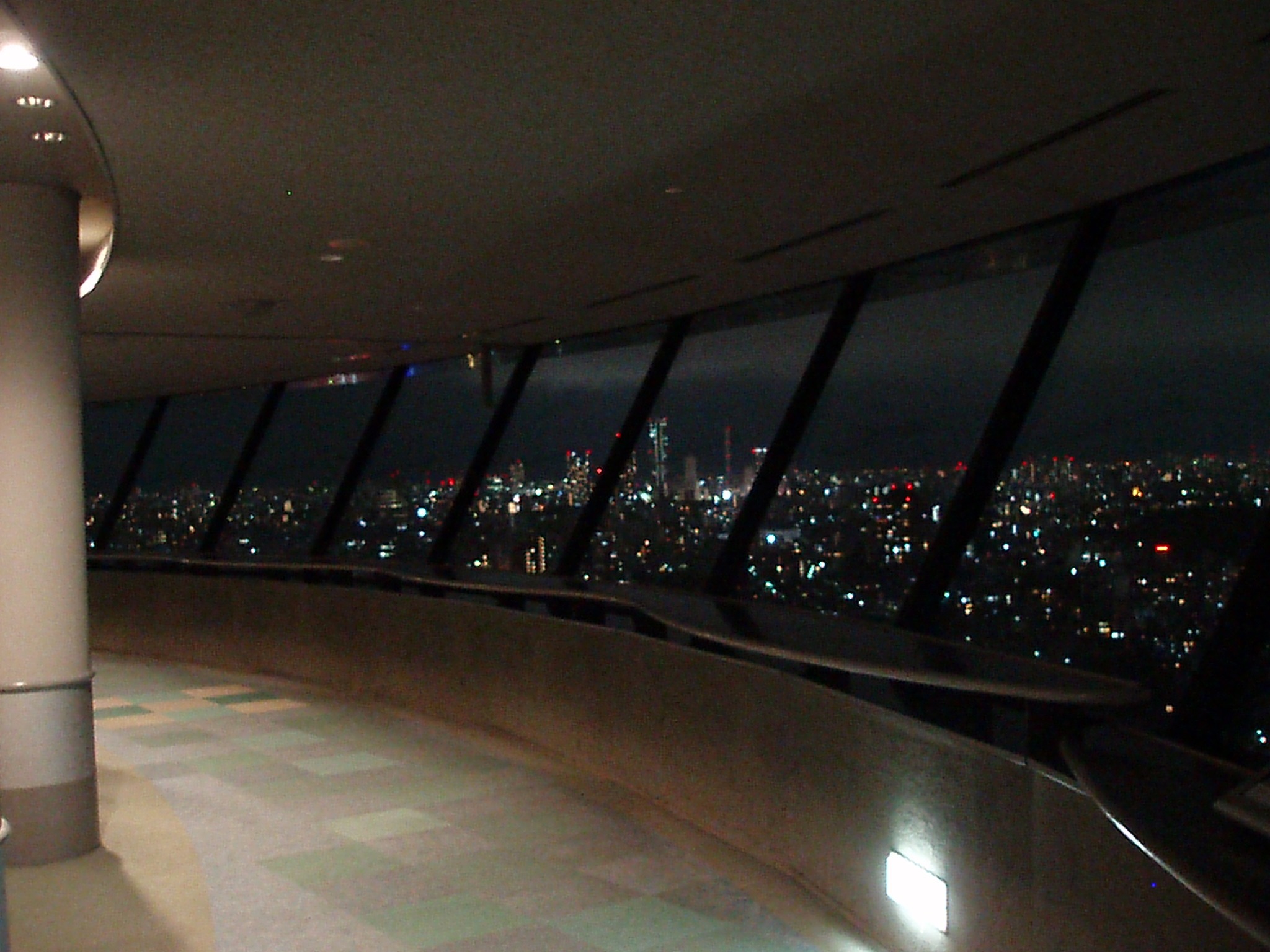 文京シビックセンター展望室